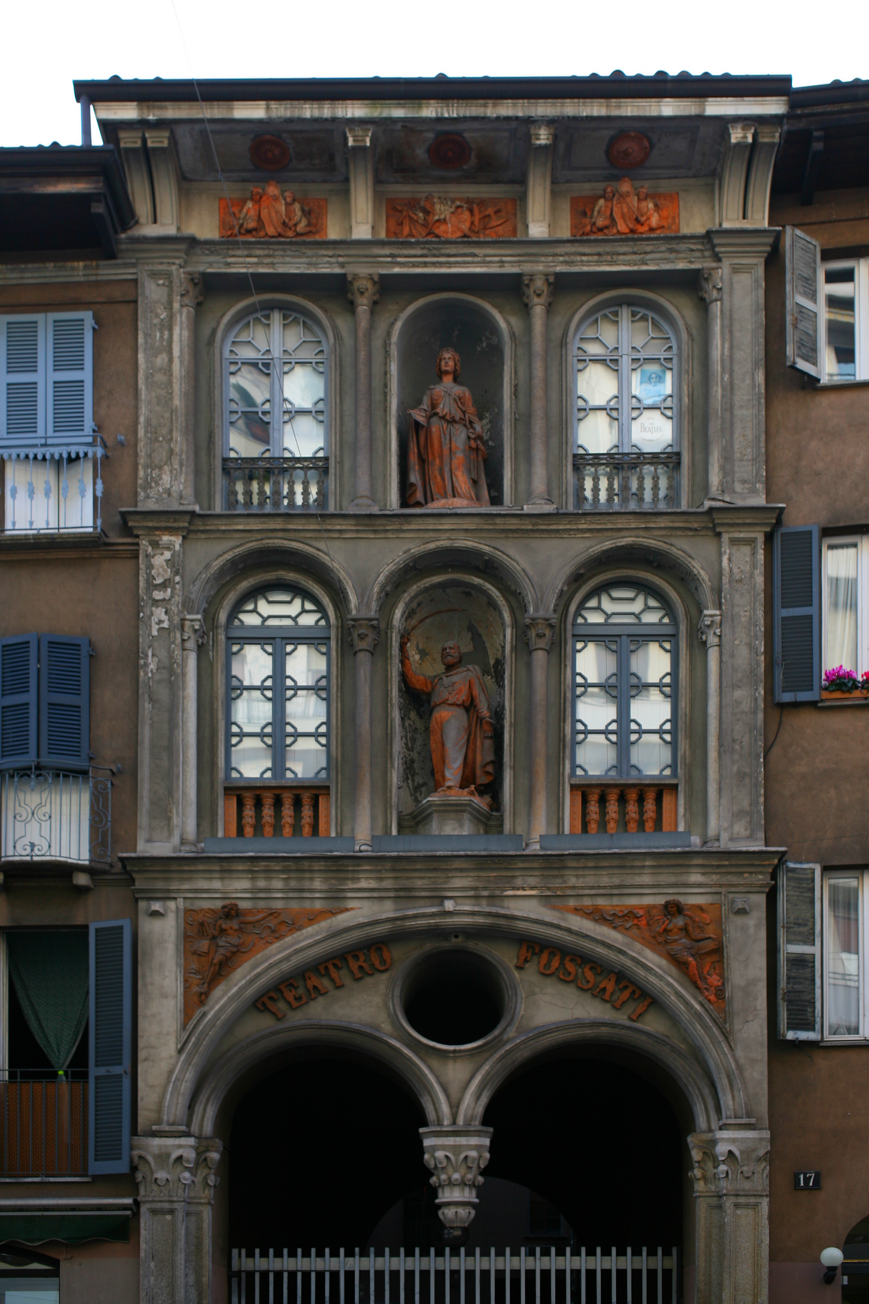 Ingresso secondario del Teatro Fossati di Milano, fotografia di Paolobon140